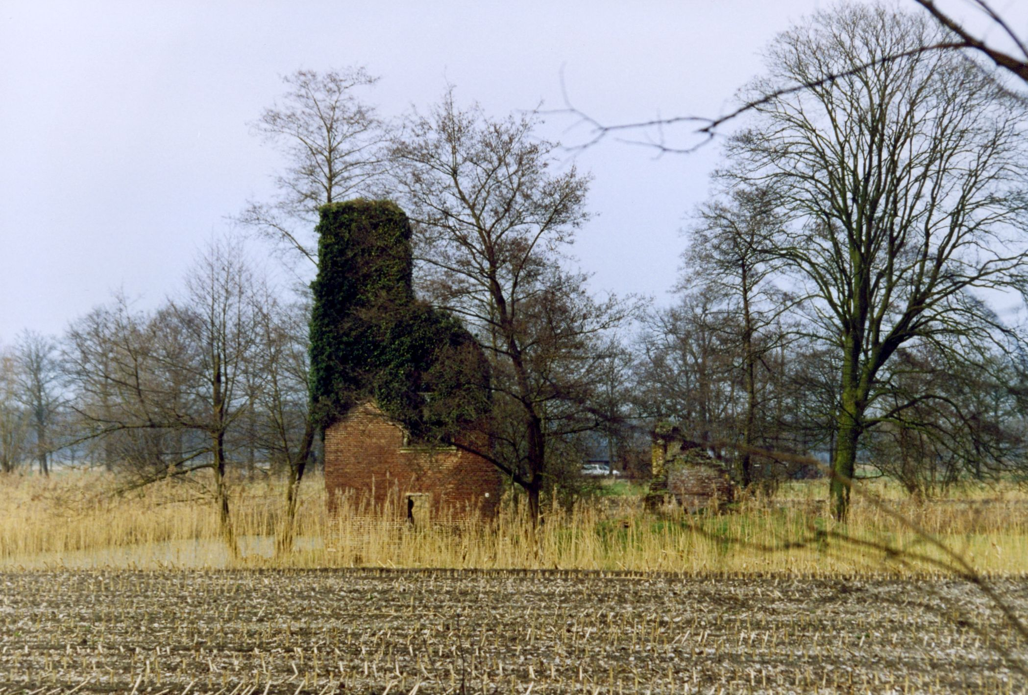 De restanten van kasteel De Nettelhorst te Laren.